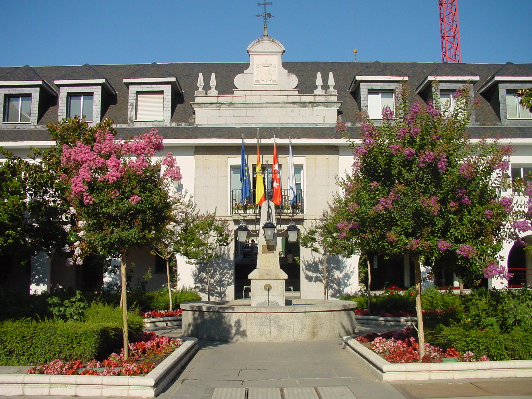 Ayuntamiento de Majadahonda.